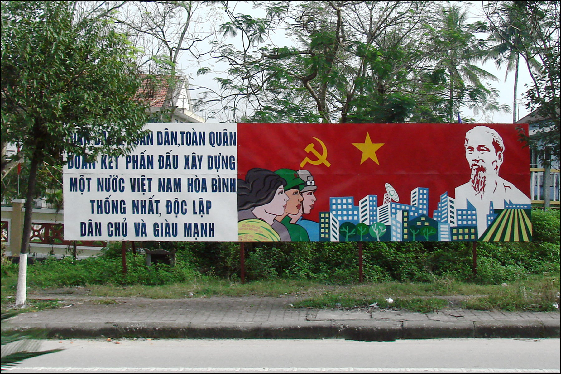 Panneau pour le 80ème anniversaire de la fondation du parti communiste vietnamien Le Parti communiste vietnamien a été fondé par Hô Chi Minh en 1930. Il était alors appelé Parti communiste indochinois.